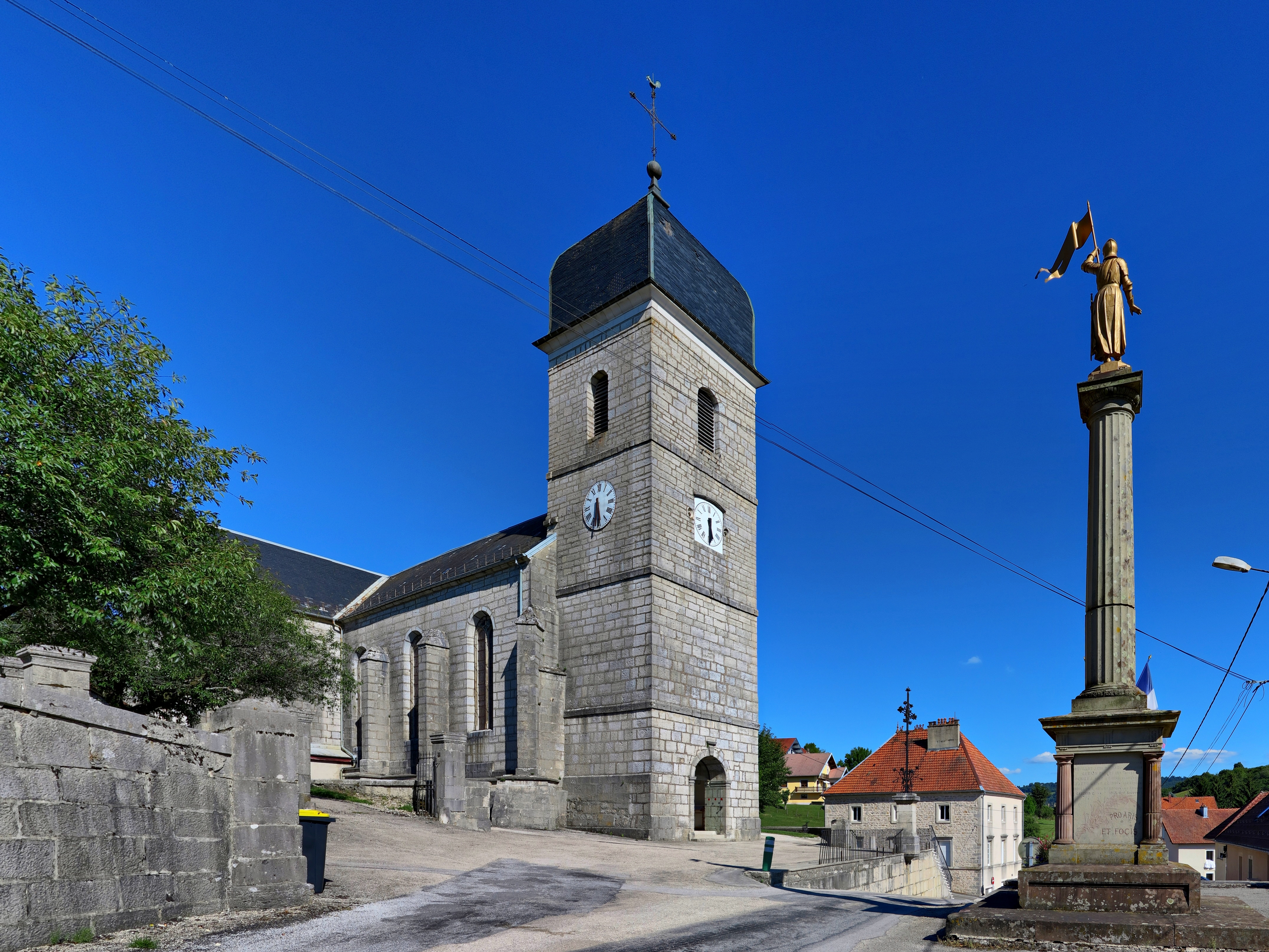 L'église